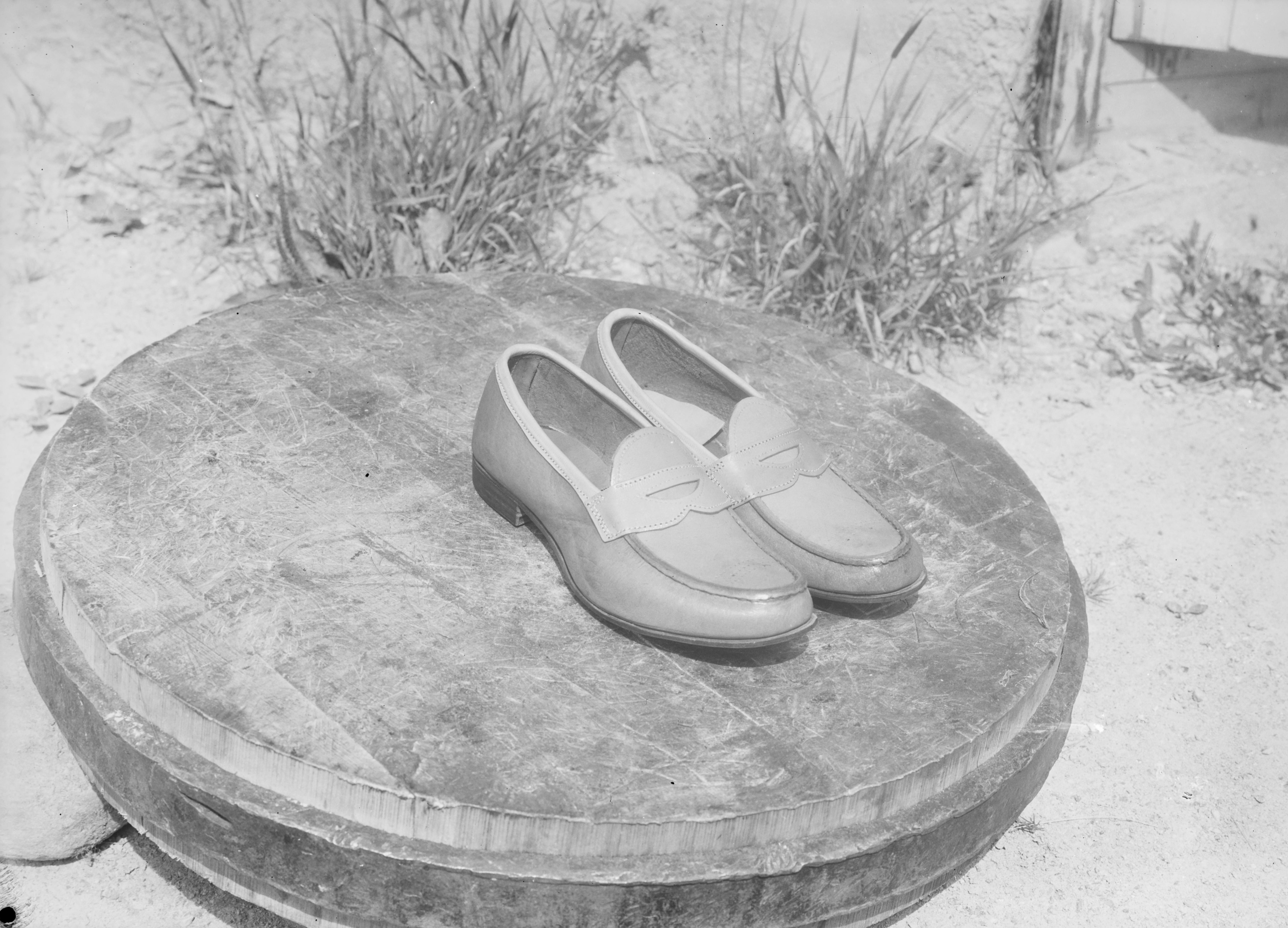 Bildet er hentet fra Nasjonalbibliotekets bildesamling. Anmerkninger til bildet var: Fotograf ukjent. Aurland, Sogn og Fjordane